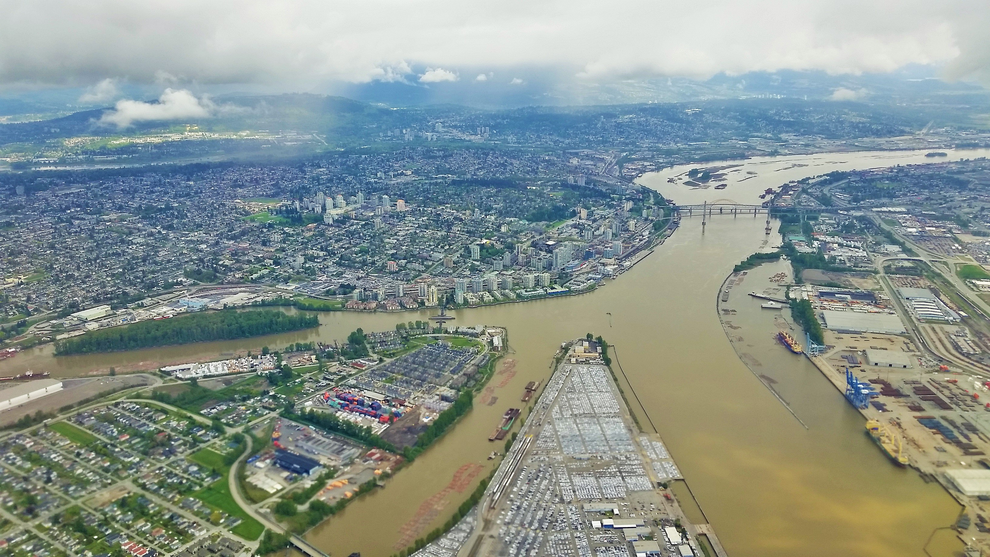 New Westminster Aerial view